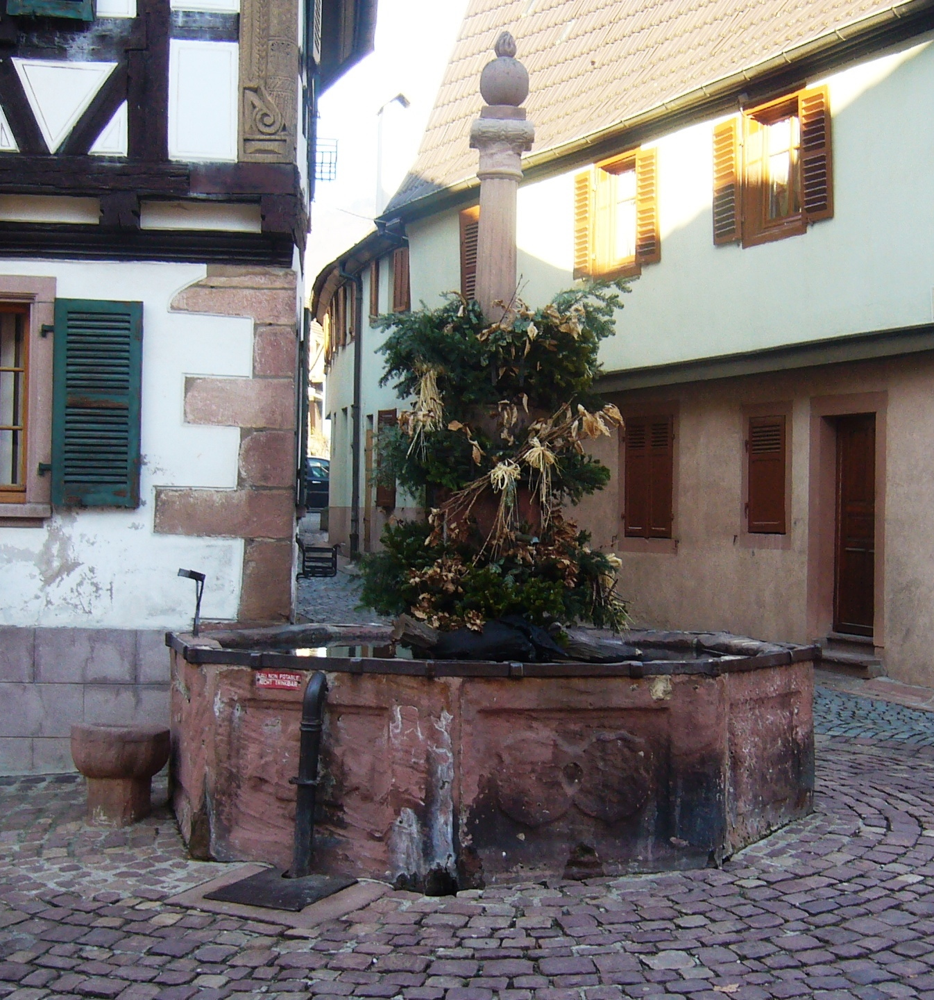 Fontaine de 1586 derrière la mairie de Saint-Hippolyte, dans le Haut-Rhin